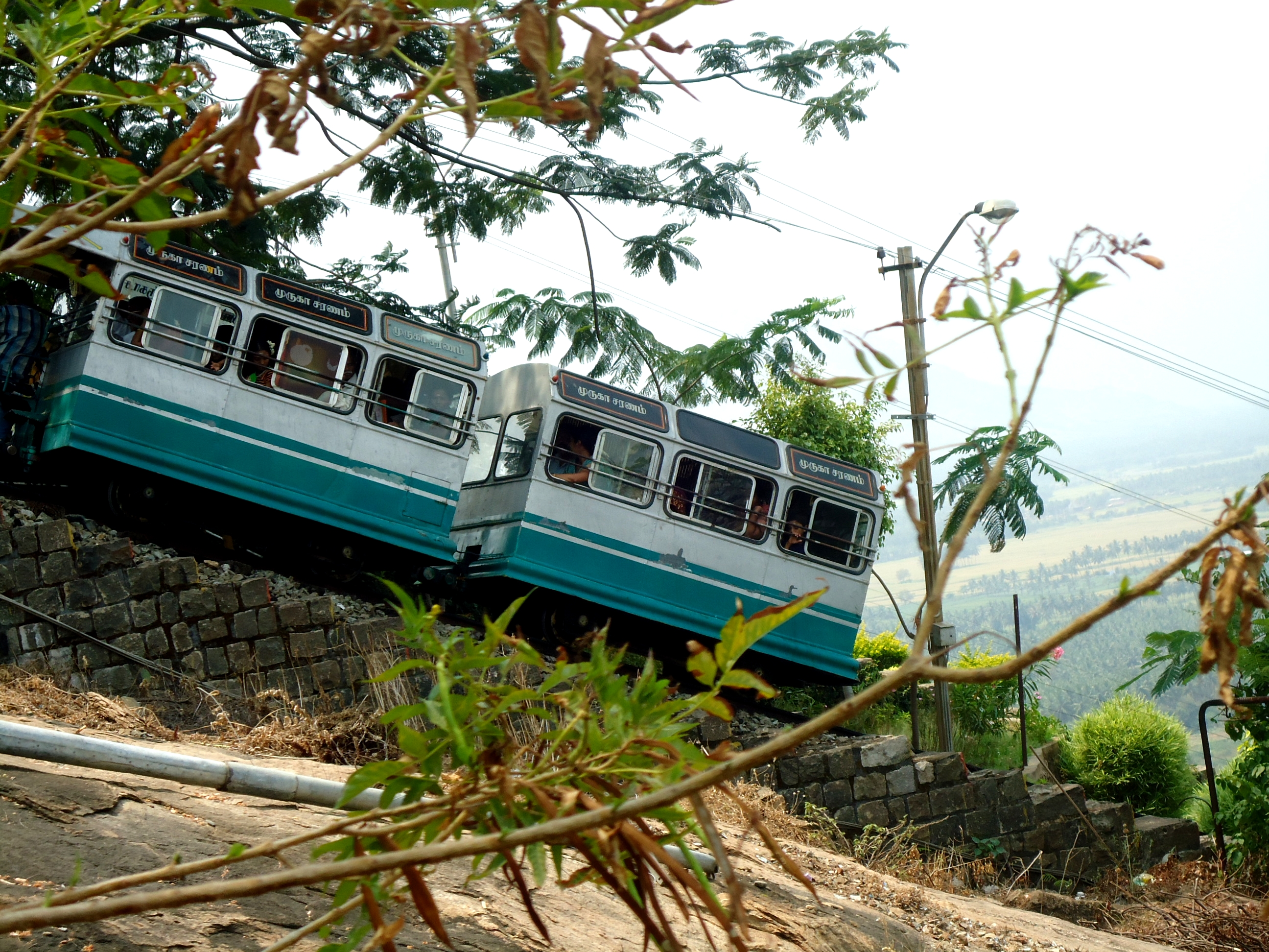 Palani Hill Rope Car1